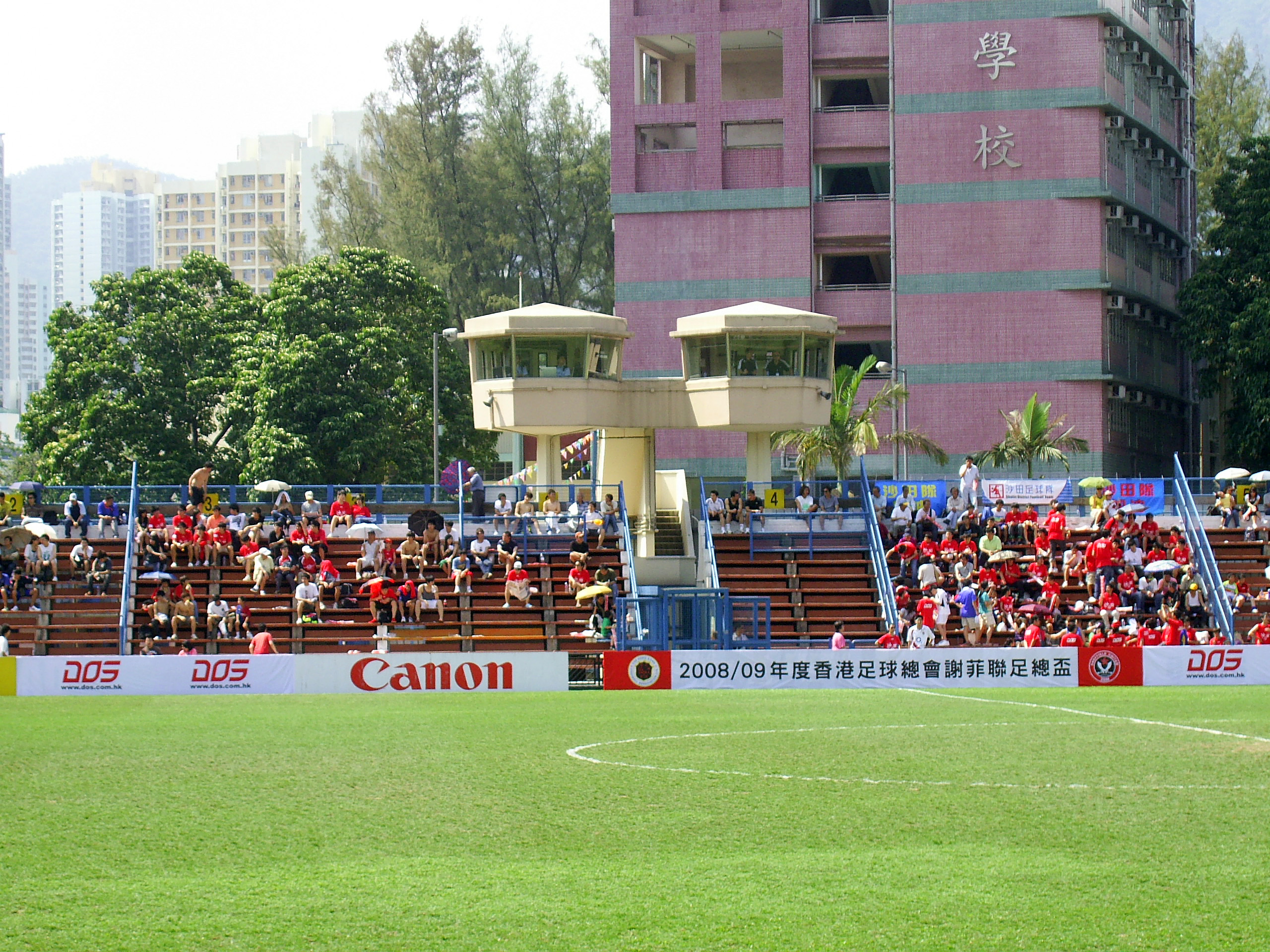 中文（香港）: 旺角大球場警察控制塔及廣播塔